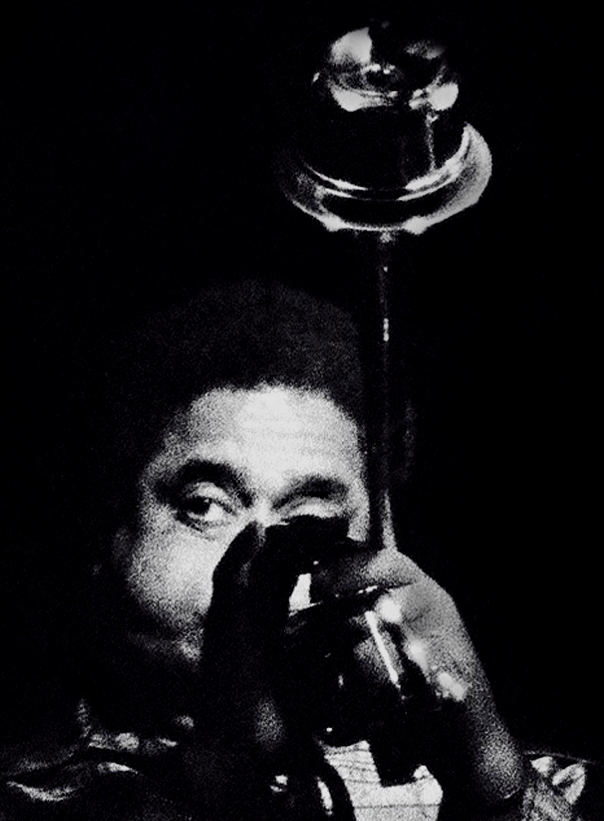 Dizzy Gillespie, Buffalo, N.Y. 1977